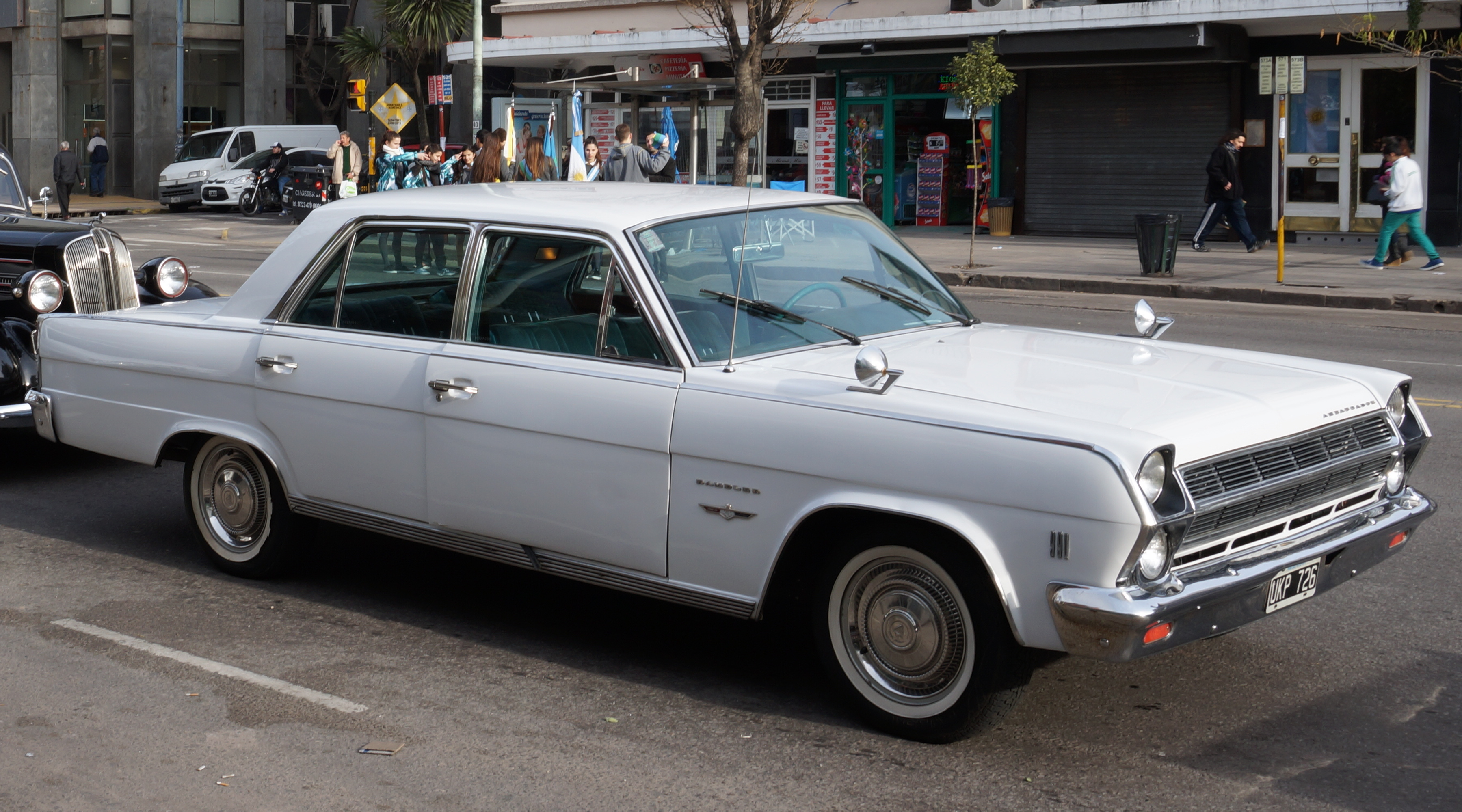 Auto antiguo en el desfile civico militar sobre la Av. Luro, Mar del Plata, Argentina